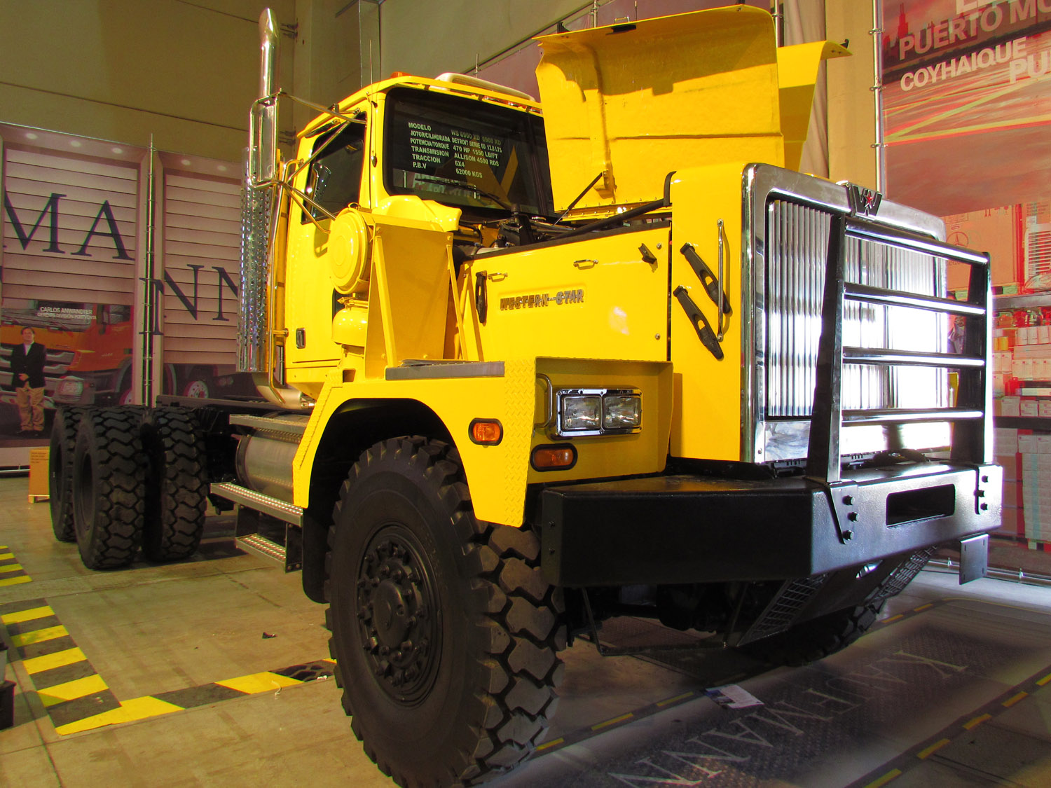 WS6900